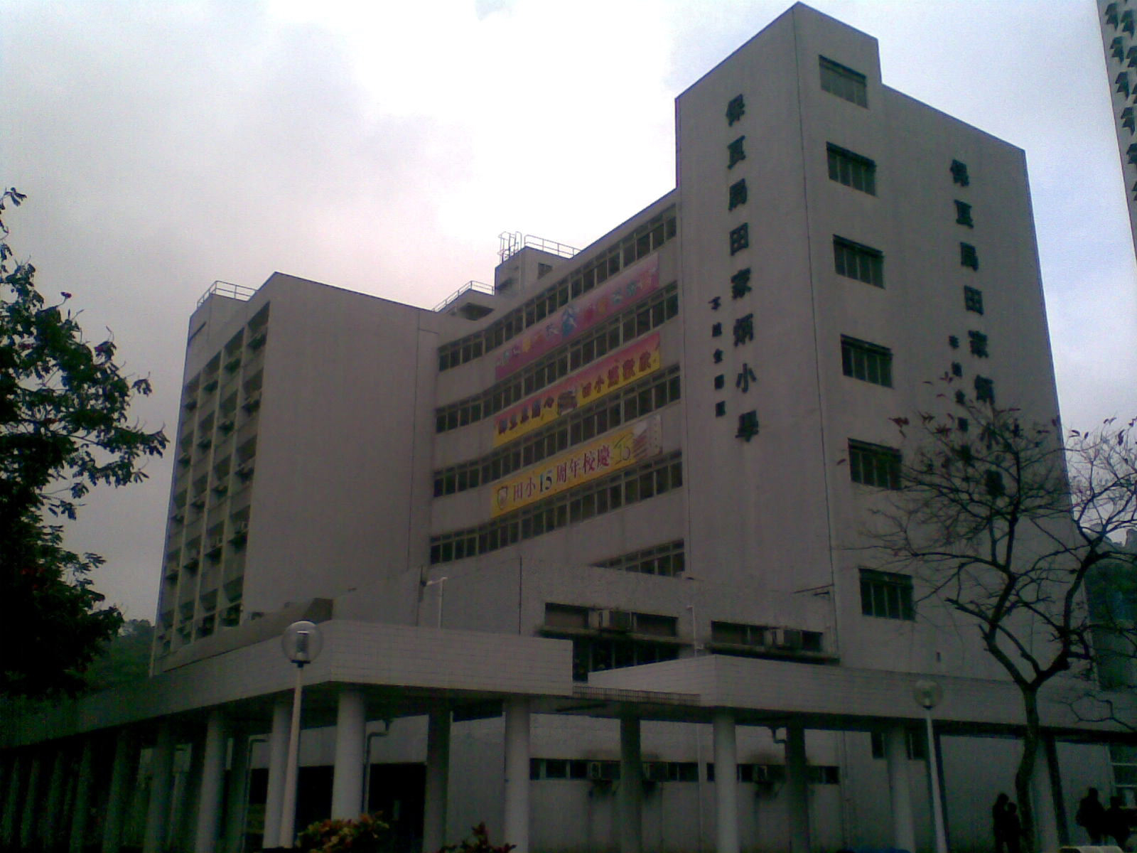 保良局田家炳小學